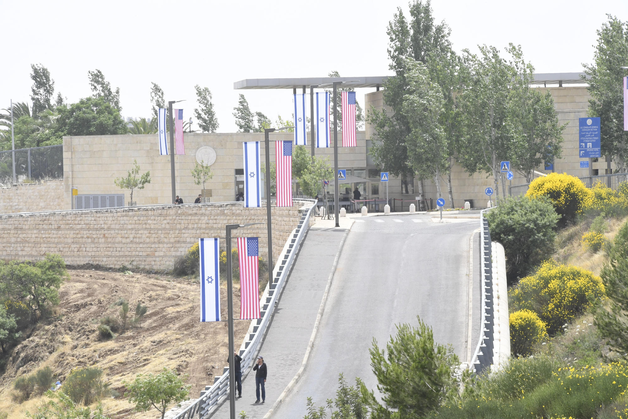 _DSC0557